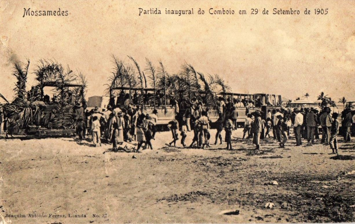 Mossamedes - Partida inaugural do Comboio em 29 de Setembro de 1905